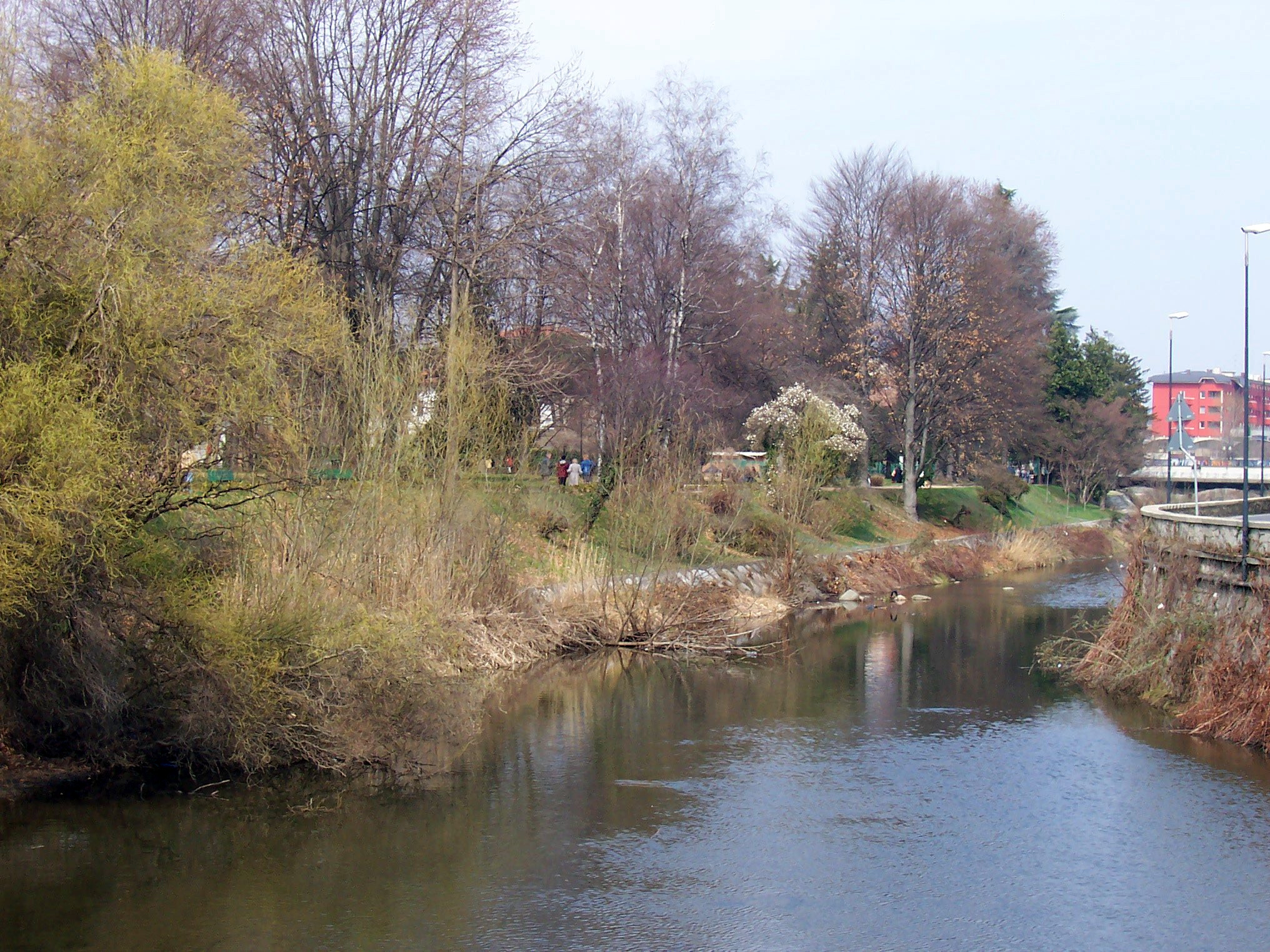 Borgomanero (Italy) - Fiume Agogna - Agogna river (e scorcio del Parco della Resistenza) Source photographed by myself Photographer Pier Luigi Mora Date 26 March 2006 Camera Data Camera Kodak CX6330 zoom digital camera